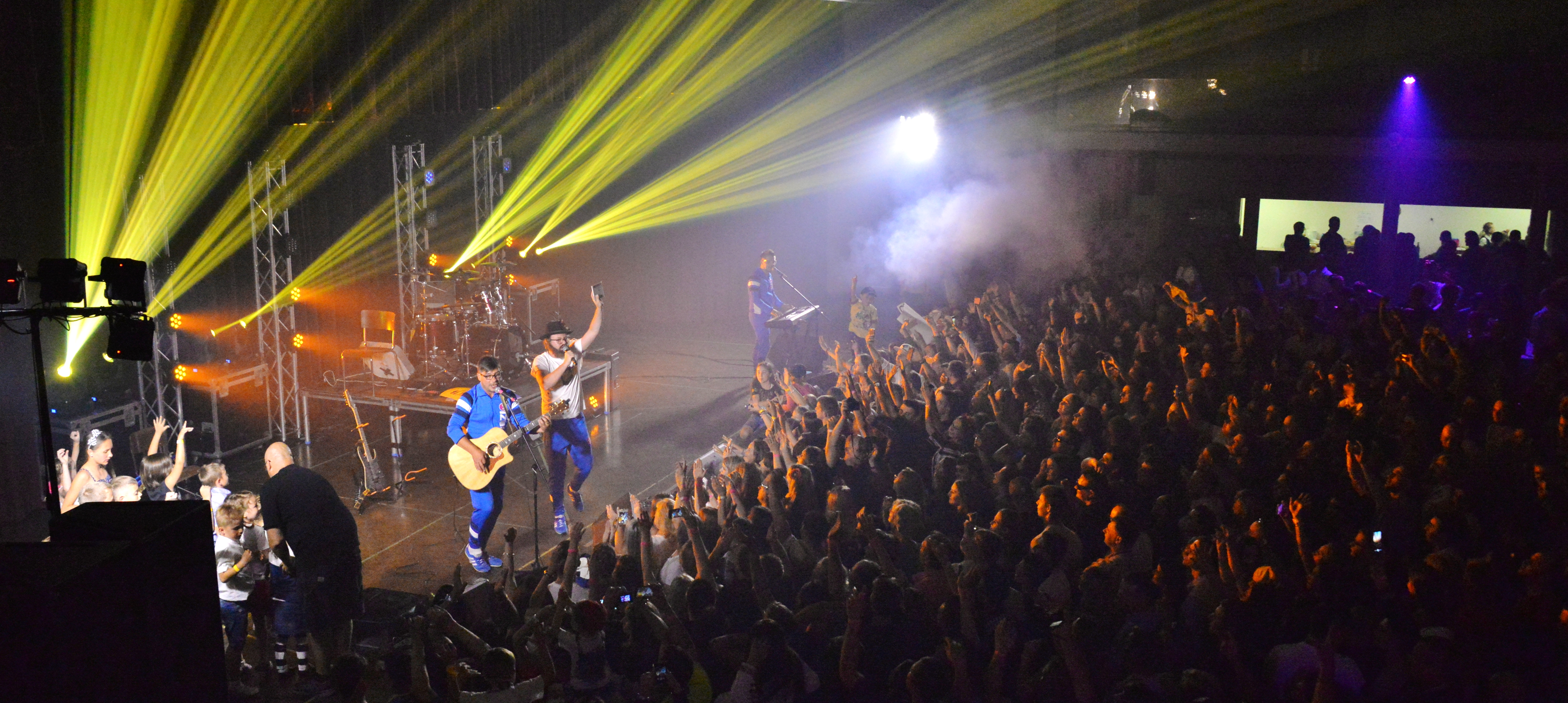 Концерт гурту DZIDZIO в Торонто 3 липня 2015 року